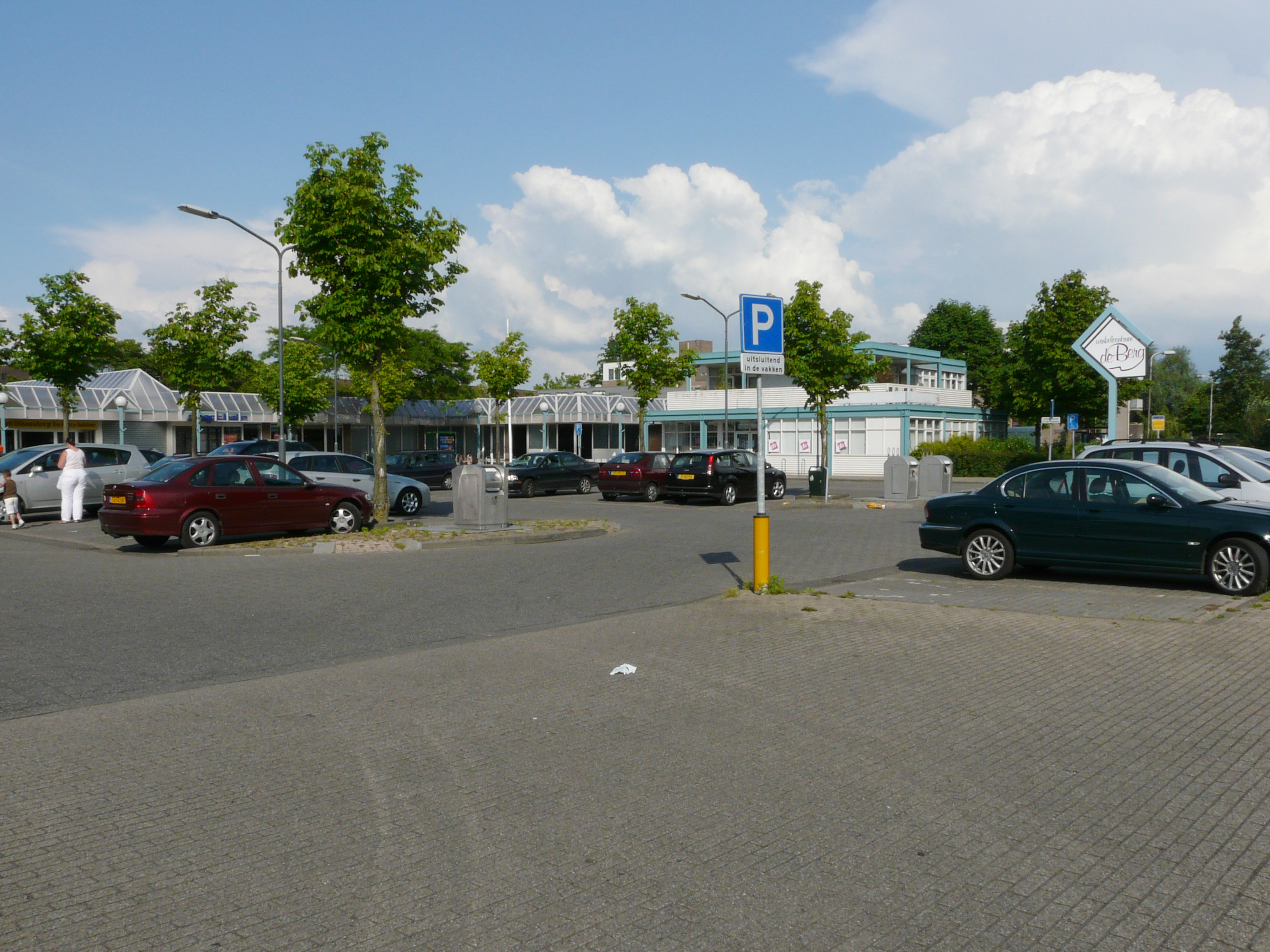 Zicht op een deel van de parkeerplaats van het winkelcentrum de Berg, nabij de Kesterenlaan, in de wijk Muizenberg in het grote stadsdeel de Haagse Beemden in het noordwesten van Breda